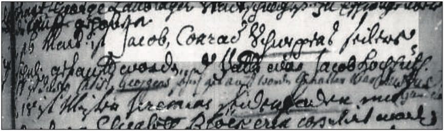 „den 16. Mertz[?] ist Jacob, Conrad Schweppeus Seilers Söhnlein getauft worden. Pate war Jacob Hochhuth“: Eintrag der Taufe im Witzenhäuser Kirchenbuch „Taufen, Konfirmationen und Trauungen von 1715 bis 1746“ unter dem 16. März 1740.